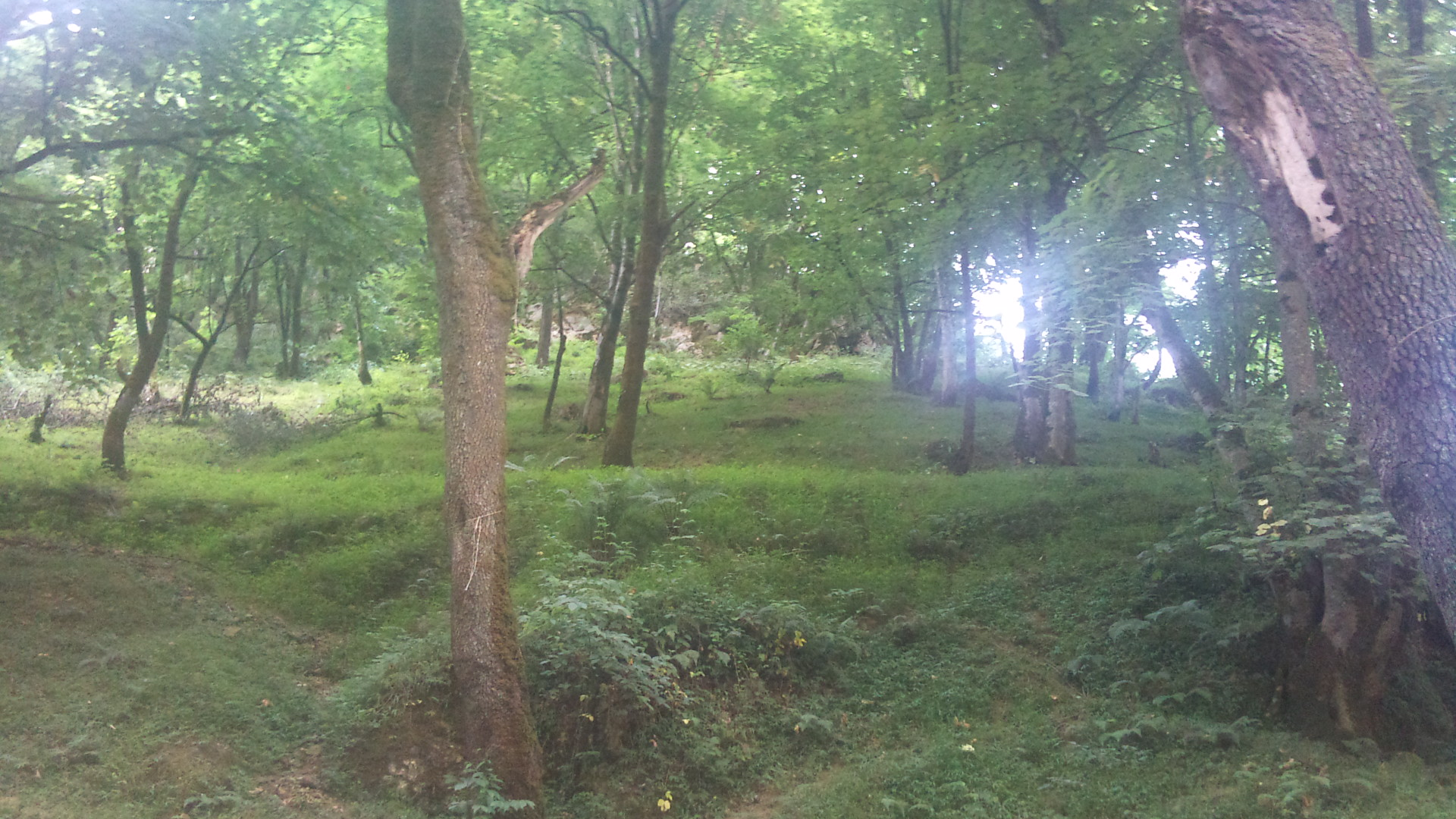 جنگل گیلان